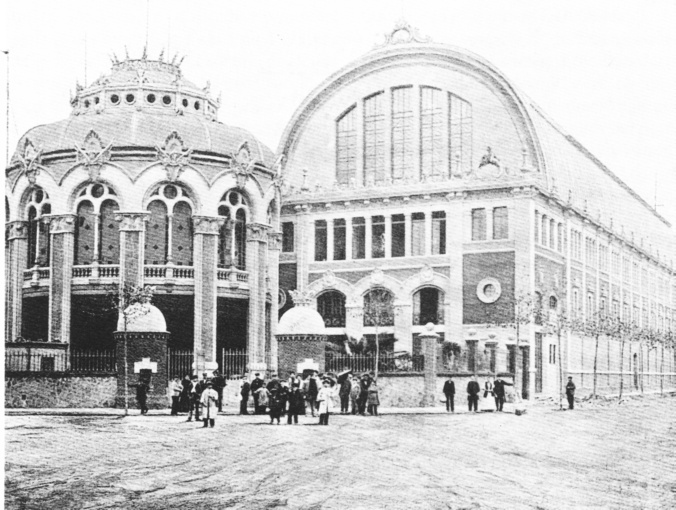 Frontón Barcelonés, de Enric Sagnier (1893)